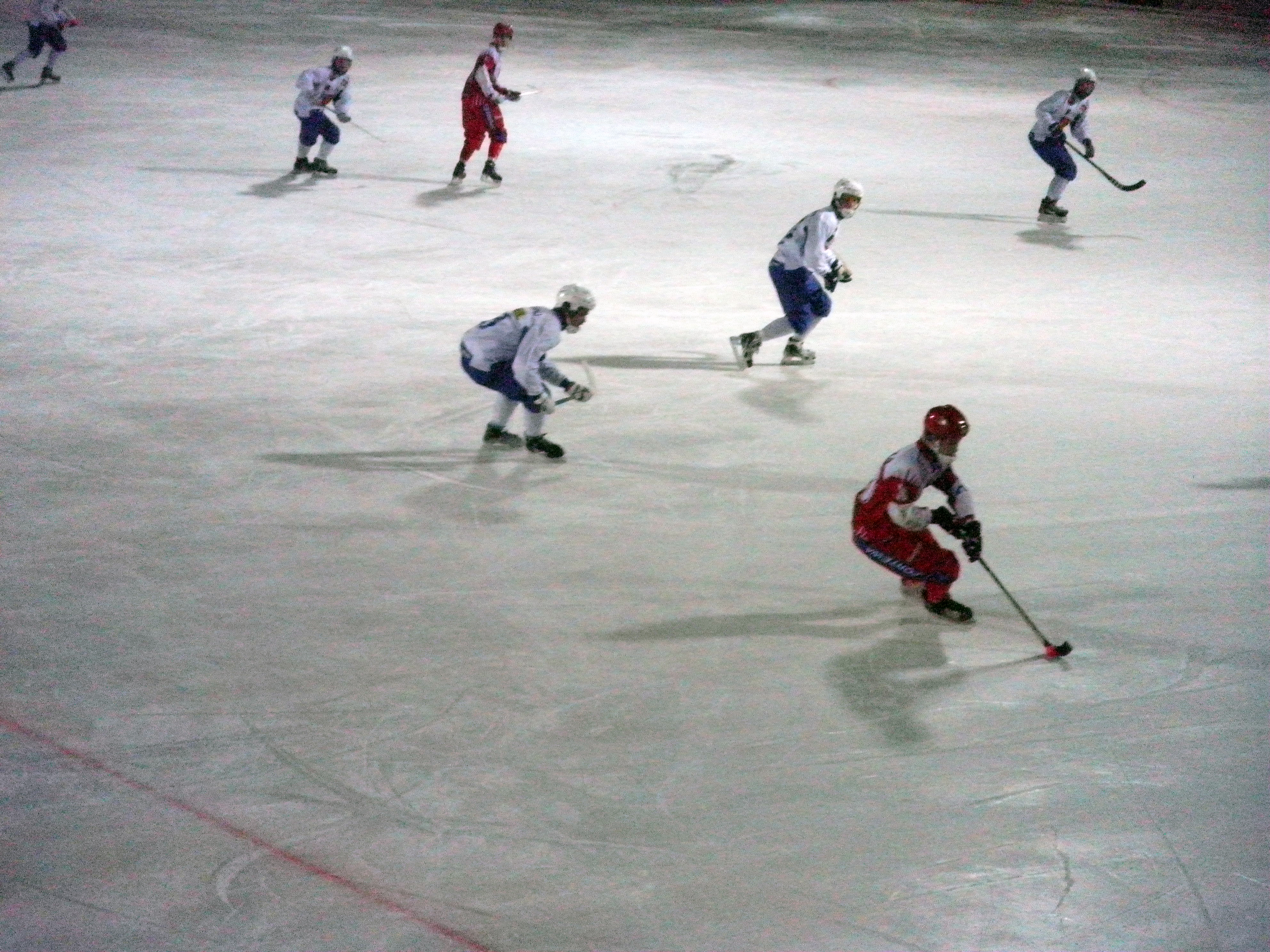 Чемпионат мира по хоккею с мячом среди молодёжных команд 2011. Полуфинал. Матч Россия—Финляндия.